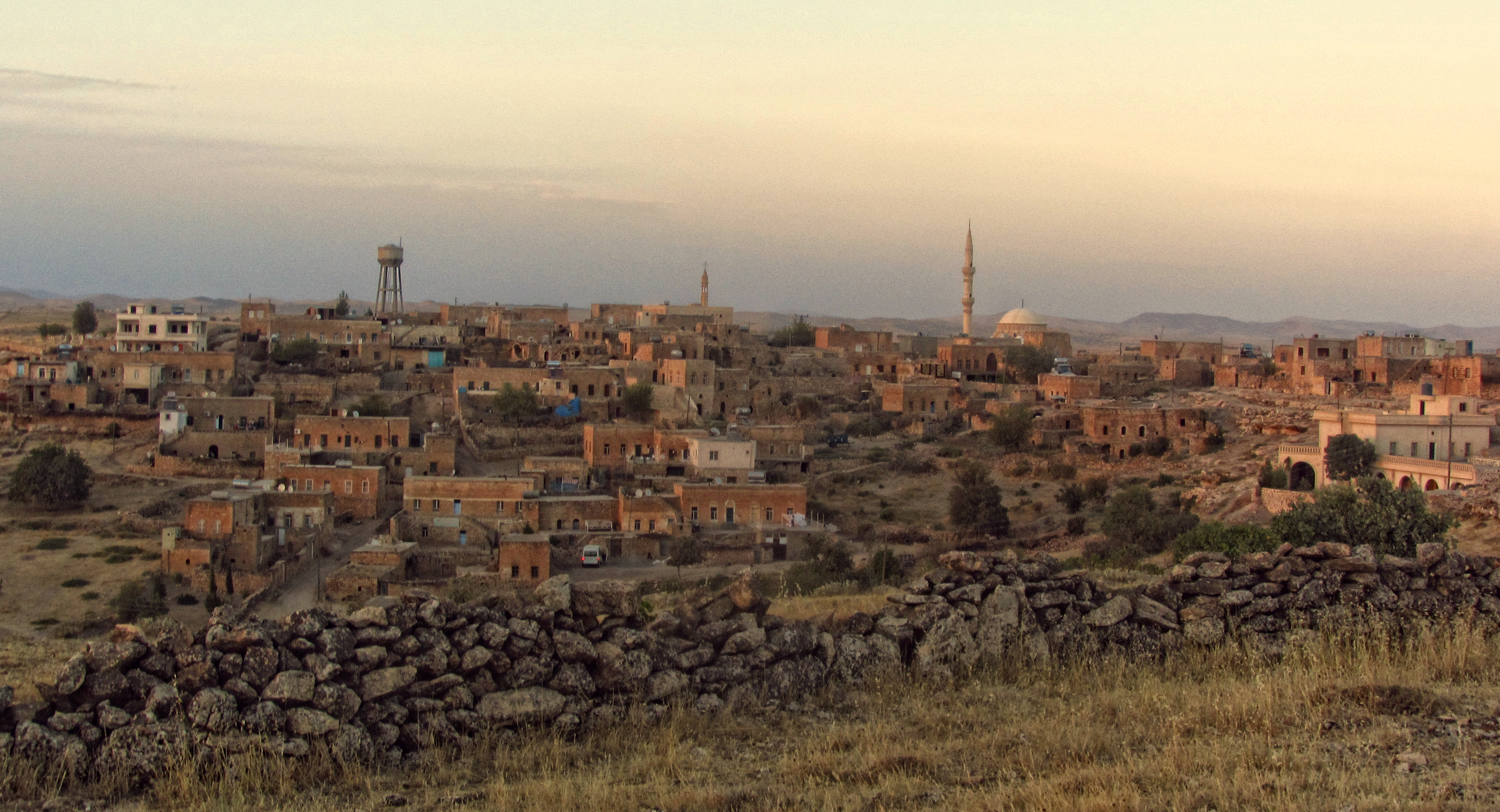 Hapsinas - Mercimekli